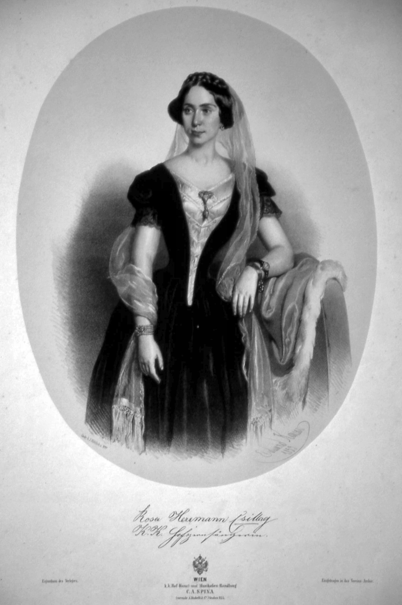 Rosa Csillag (1832–1892), österreichisch-ungarische Opernsängerin; Lithographie von Eduard Kaiser, 1853